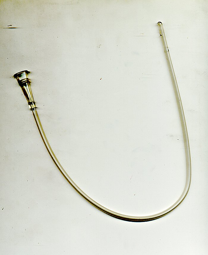 Cewnik urologiczny (nelaton)